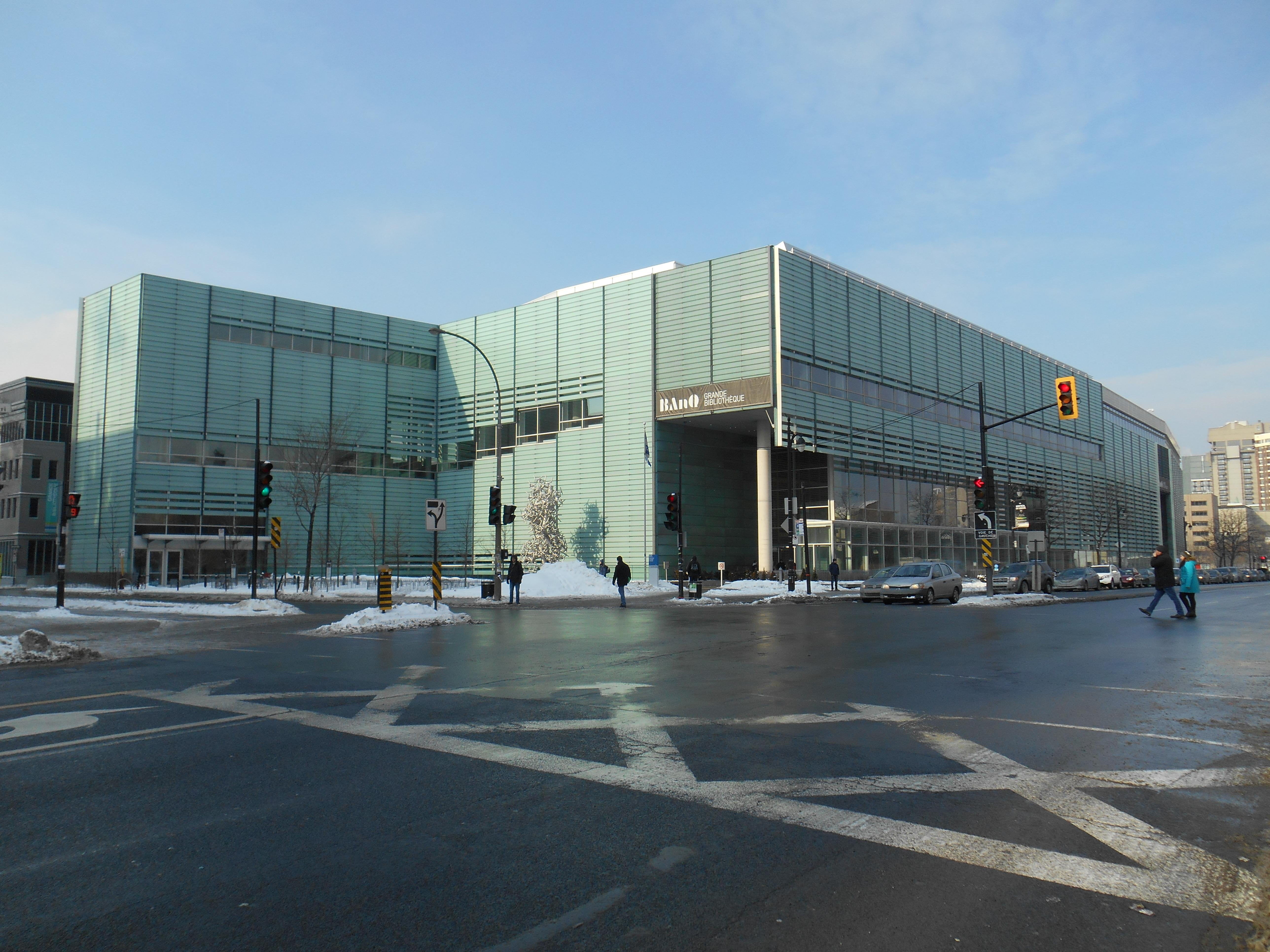 La Grande Bibliothèque, 475, boulevard De Maisonneuve Est, Montréal